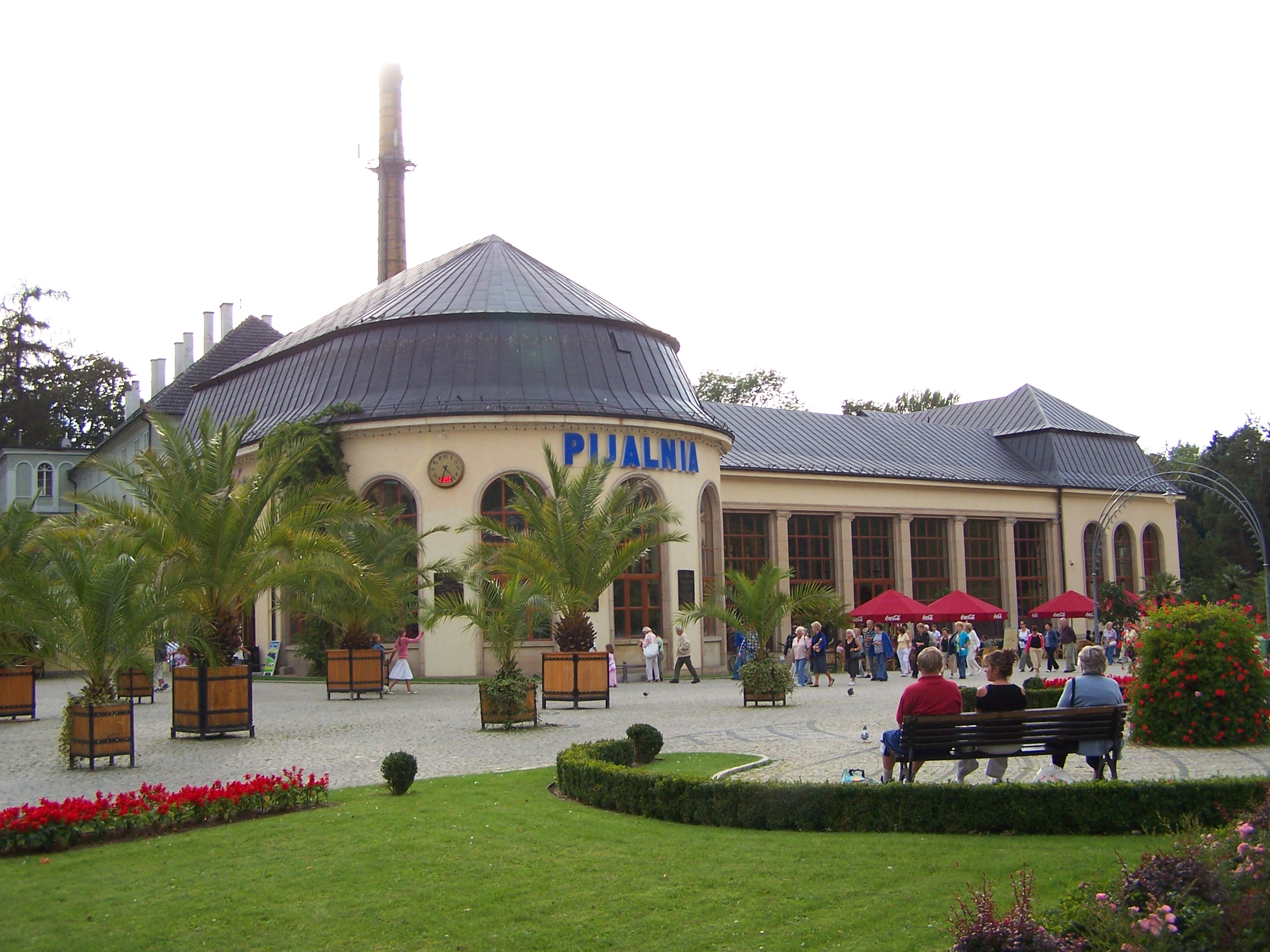 Pijalnia wód mineralnych w Kudowie-Zdroju.